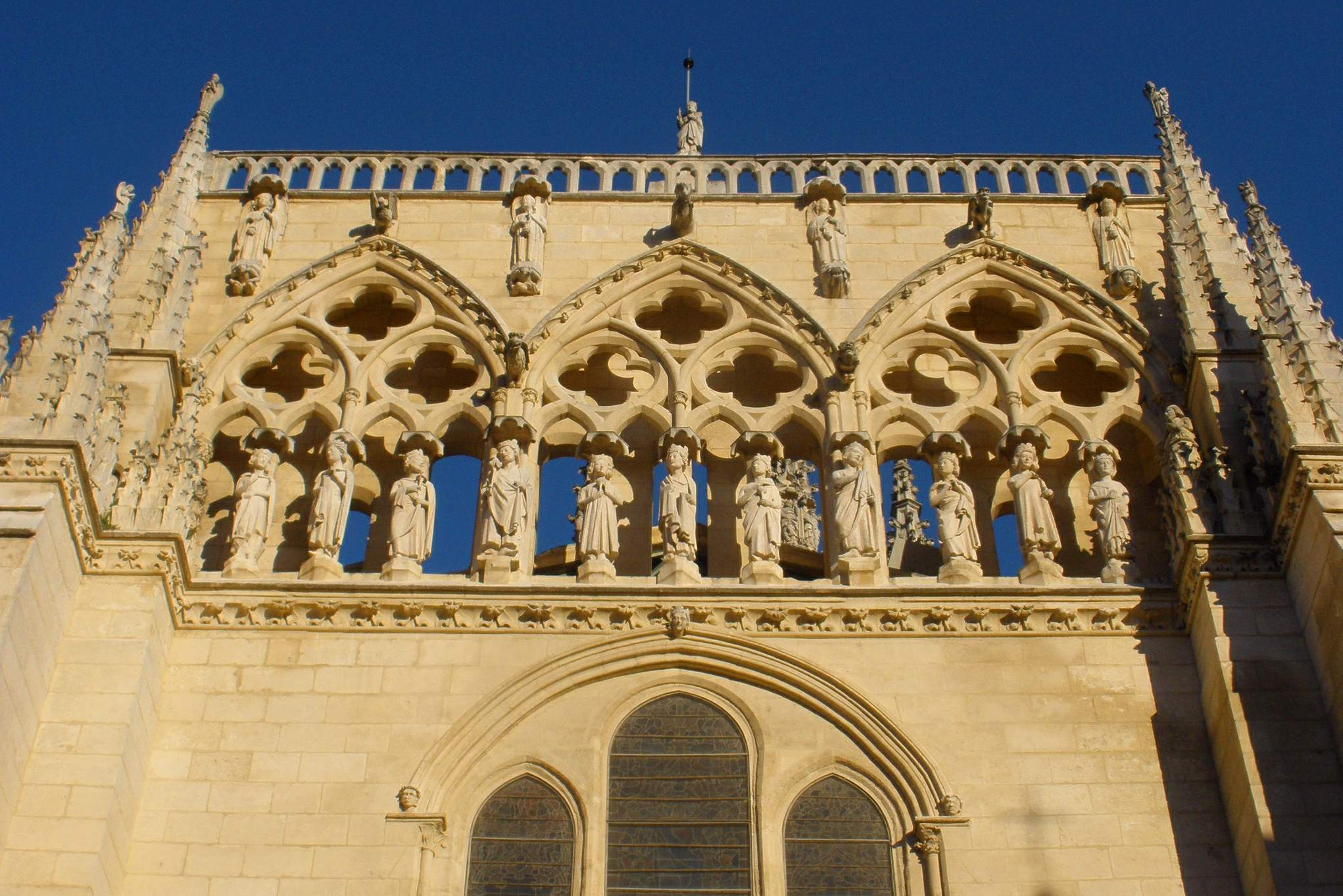 Burgos - Catedral